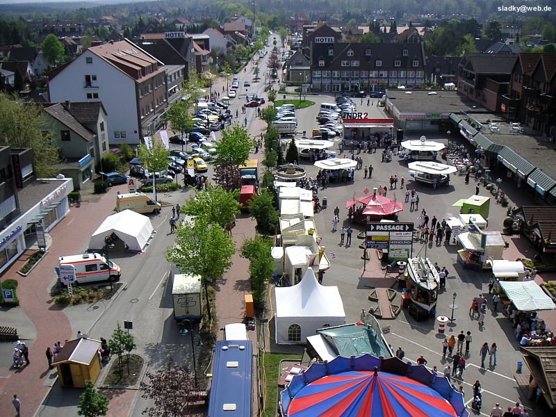 Neu Wulmstorf - Bahnhofstr. Süd